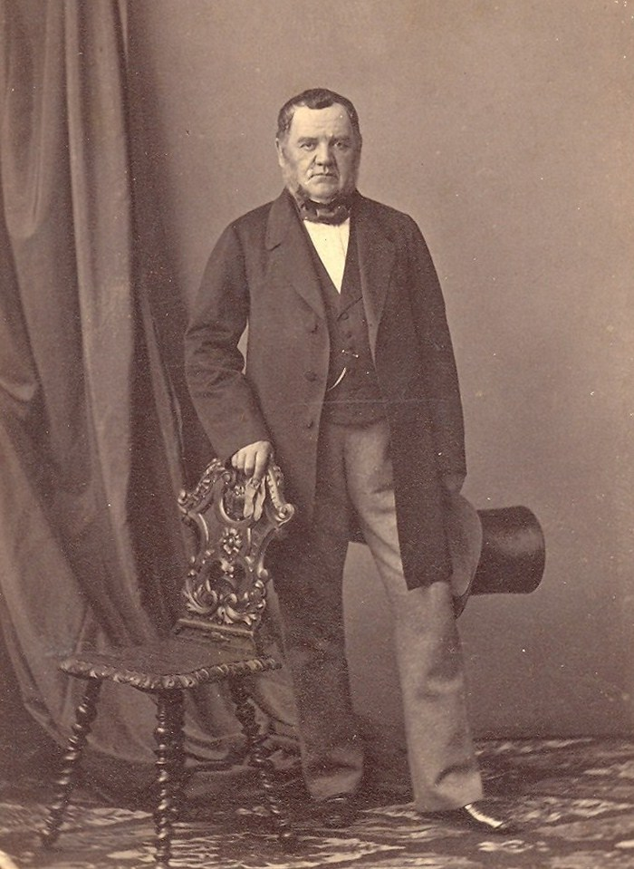 Павел Александрович Муханов (1797–1871)